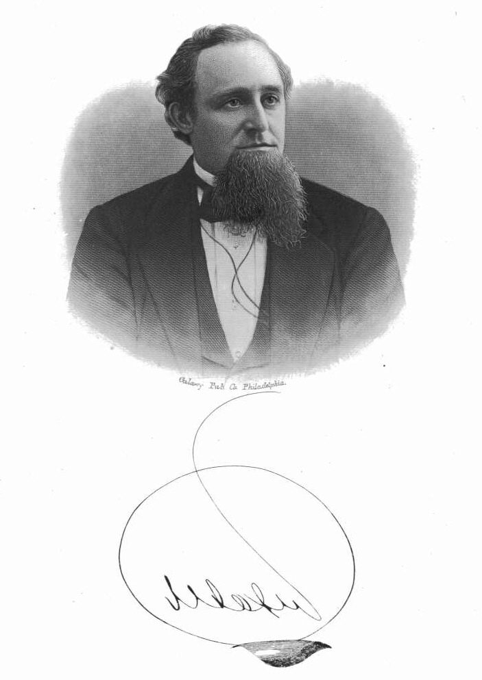 Mořic Loth, kolem 1870.